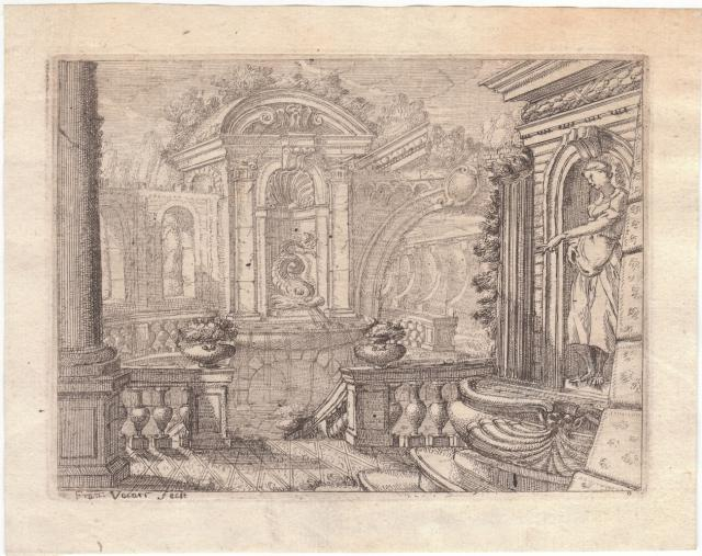 Pittore e ornamentista barocco, allievo a Bologna del pittore Francesco Albani, si specializza nel paesaggio. Ha pubblicato un trattato sulla prospettiva illustrato da se medesimo. Il foglio è una delle dodici tavole ricordate dal Nagler che costituiscono la serie raffigurante architetture d’invenzione, fontane e rovine. Il numero della tavola in basso a destra non è leggibile perché non ben inchiostrato. Il British Museum possiede altre quattro tavole della serie (es.1896,1118.41) e le data al 1660-87. Esemplare intonso, buoni margini. Filigrana: “sirena” Bibliografia: Scheda tecnica di Matteo Crespi, Il bulino antiche stampe Milano, 2012.